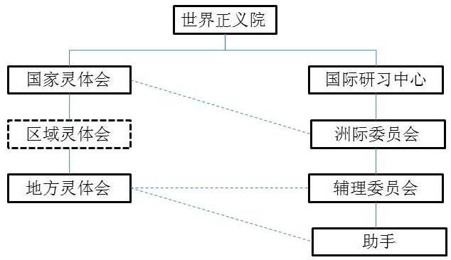 巴哈伊行政机构图